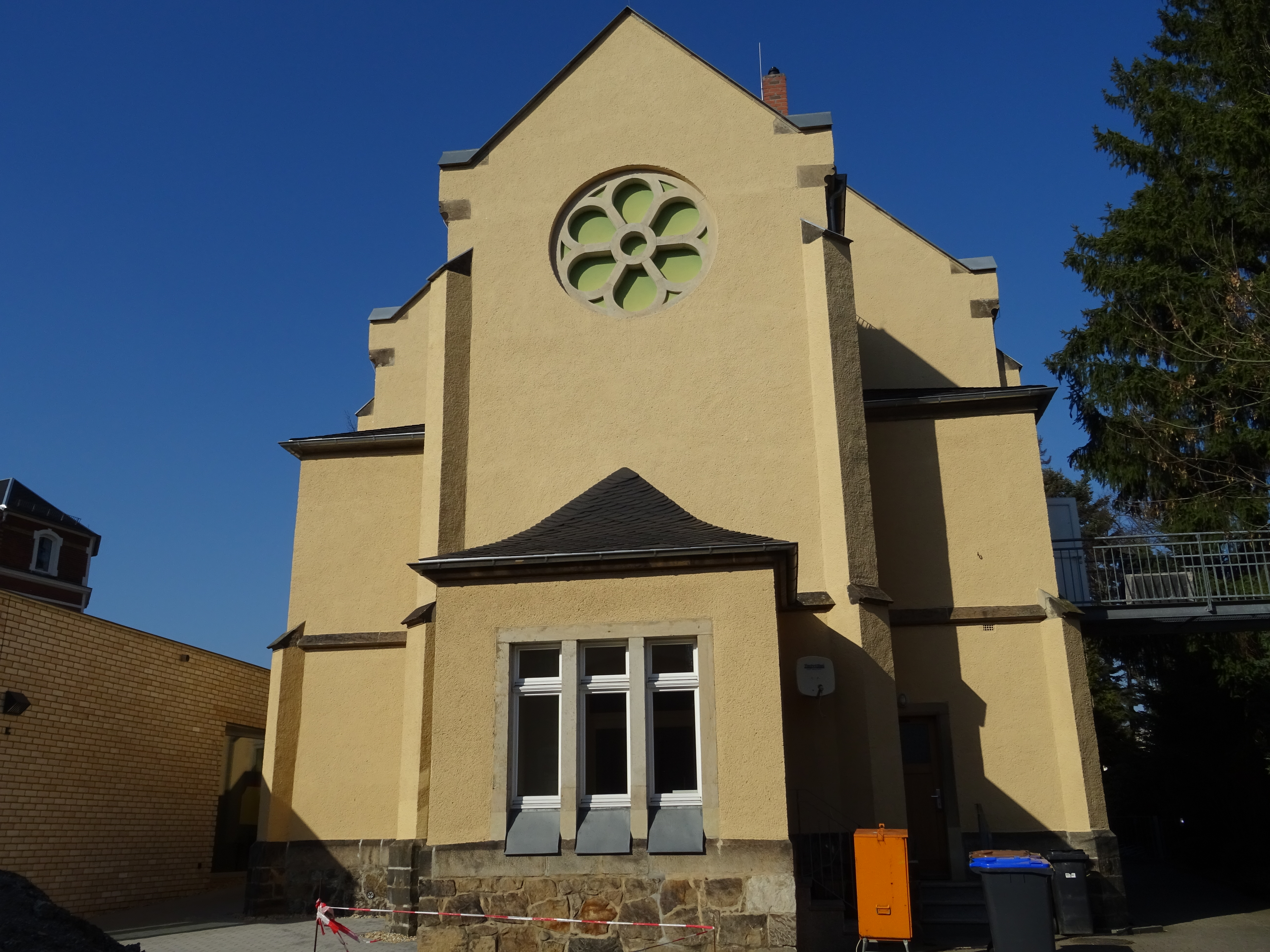 Katholische Kirche in Radeberg, erbaut von 1882 bis 1883 in neogotischen Stil. Derzeit finden Renovierungsarbeiten statt (21.03.2019)